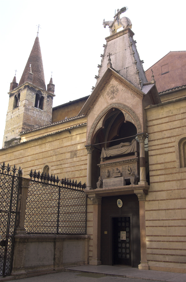 Chiesa di Santa Maria antica e arca di Cangrande della Scala